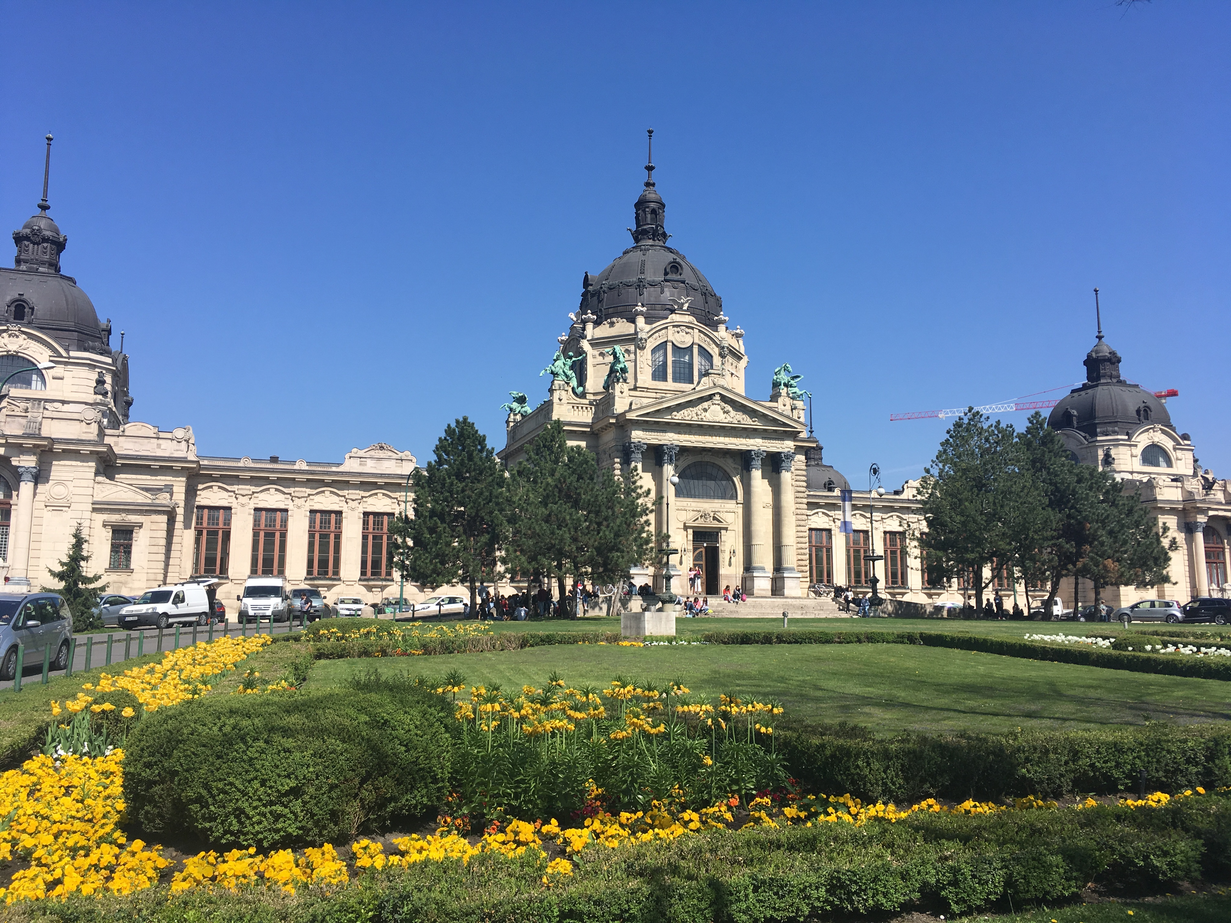 Széchenyi gyógyfürdő, a Dvorák Ede és Gerster Kálmán-féle szárny. (A tervek Czigler Győző terveinek átdolgozásával készültek.)